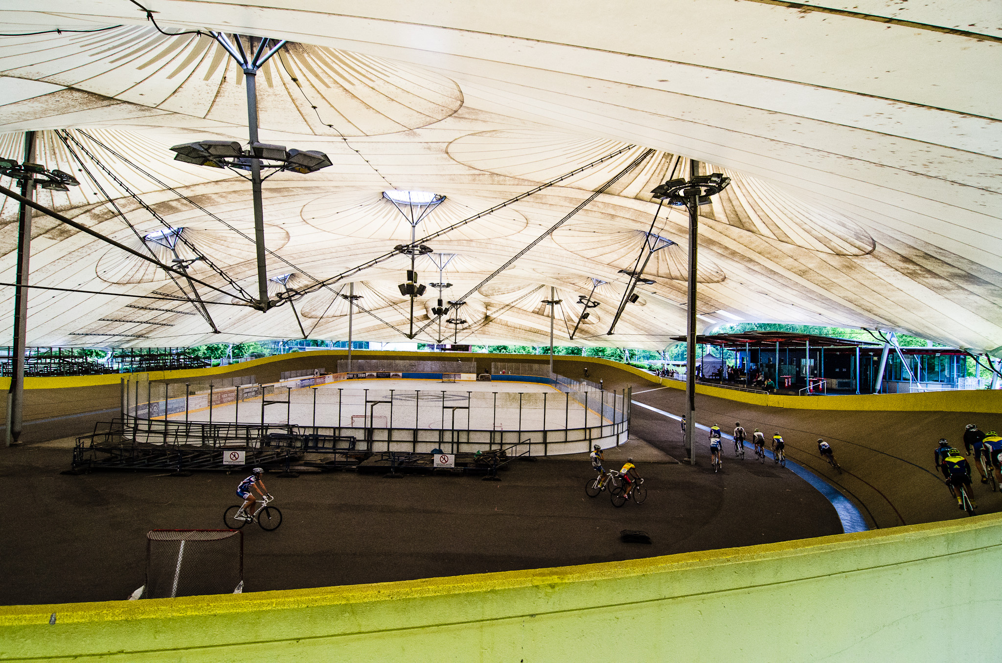 Innenraum, rechts die Tribüne, in der Mitte eine Spielfläche (im Winter als Eisbahn)